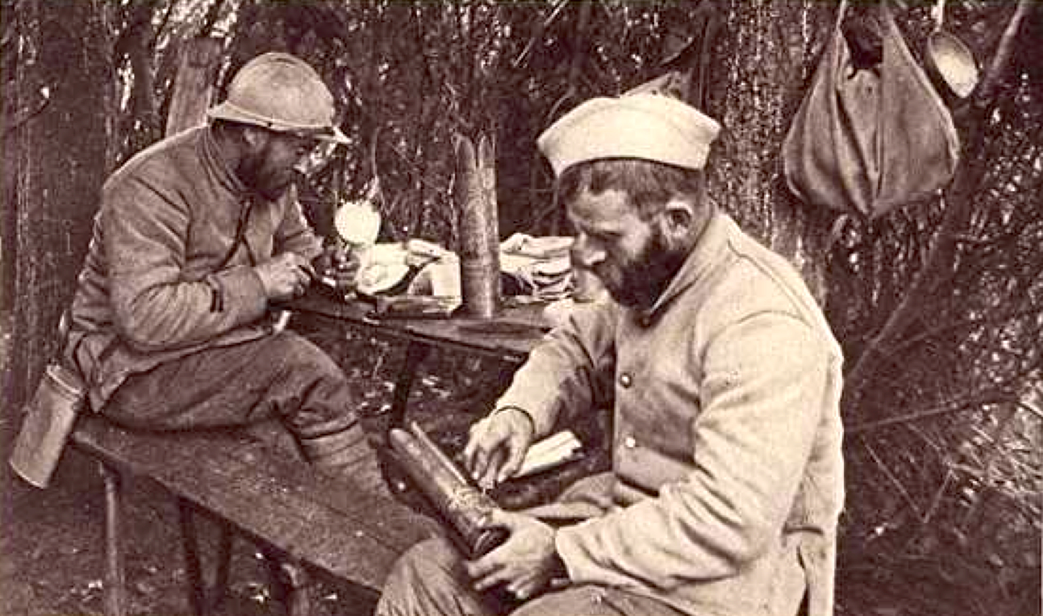 Artisanat de tranchée poilus au travail guerre de 1914-18